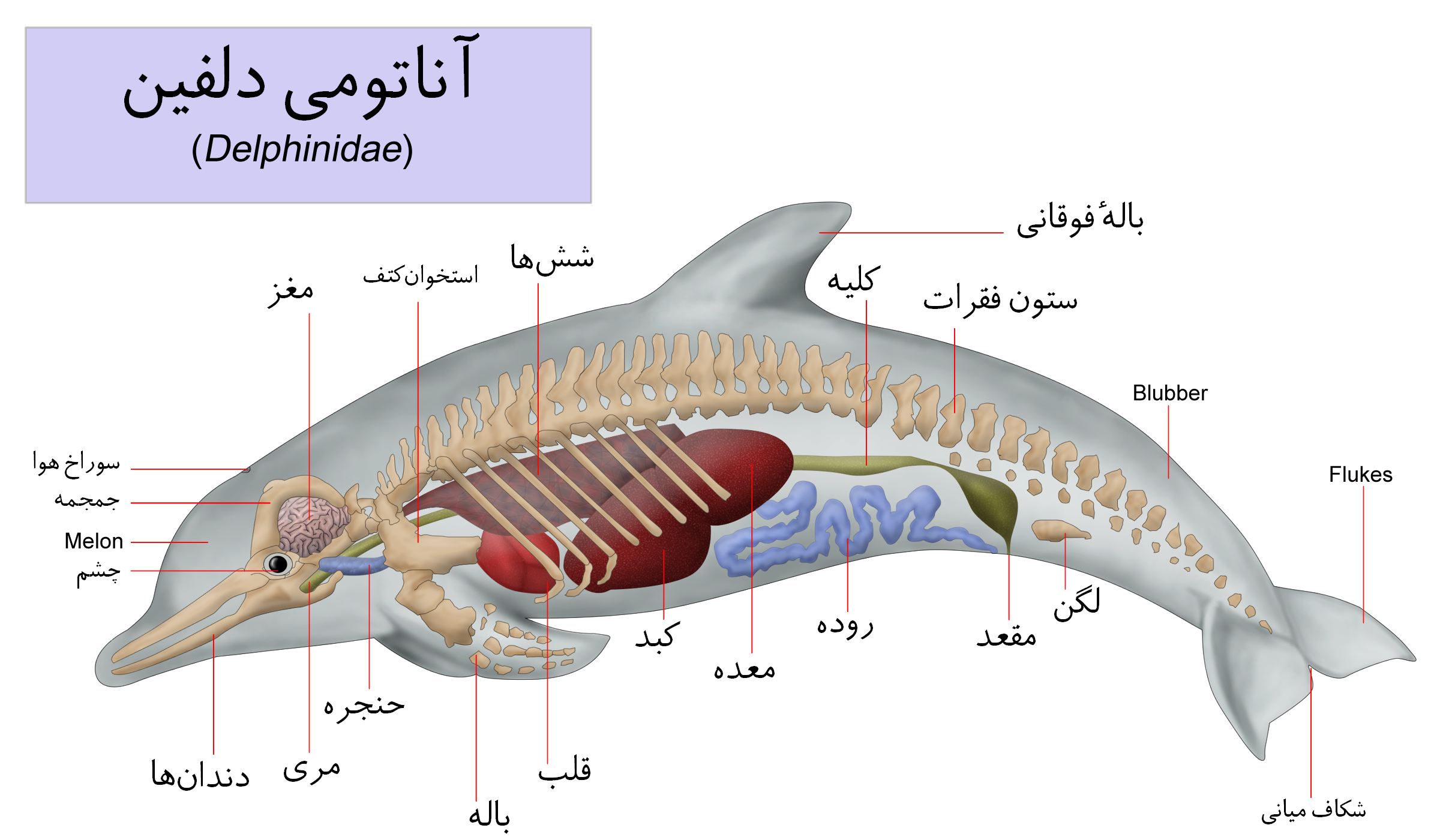 آناتومی دلفین